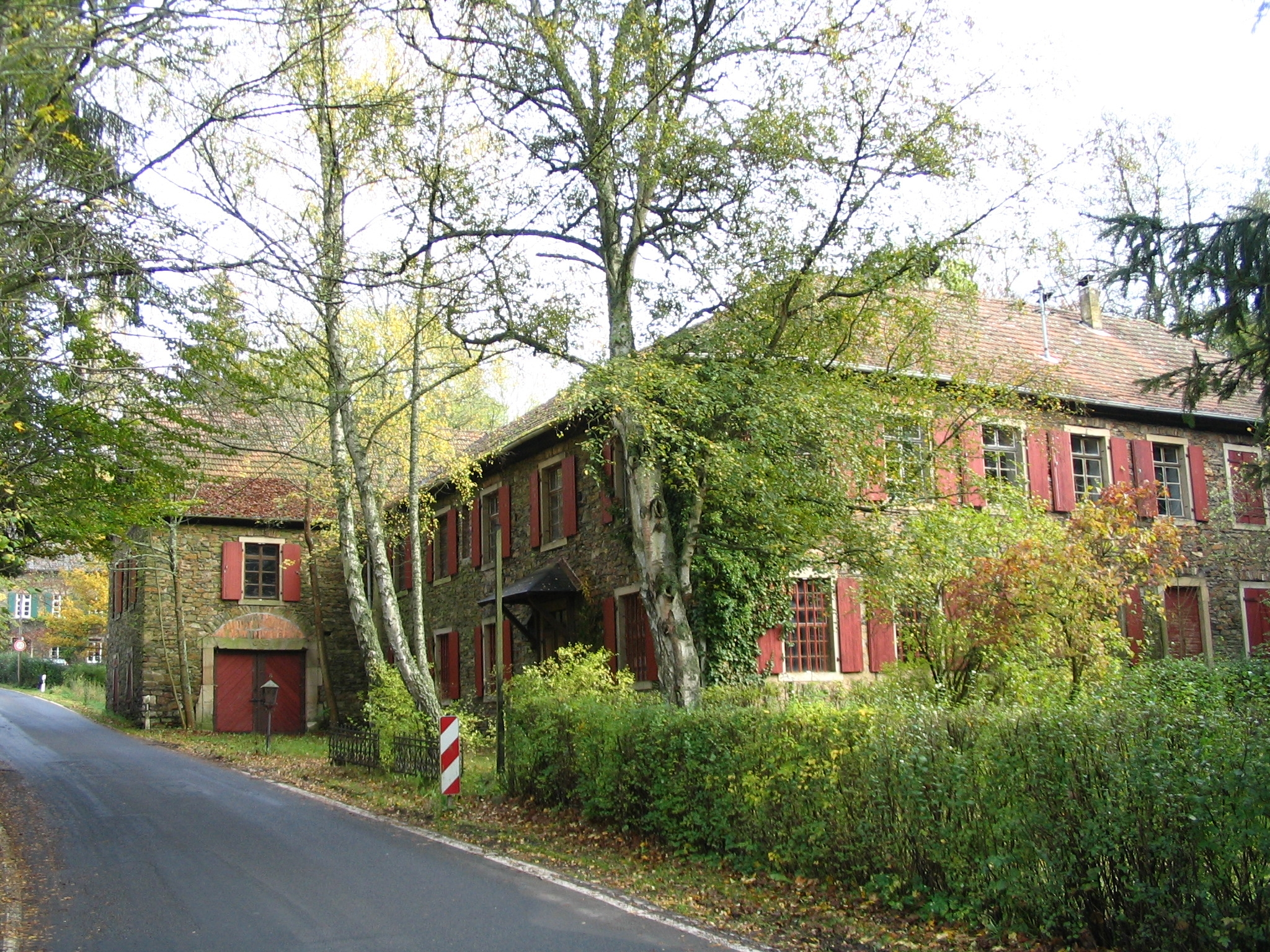 ehemaliges Magazin der Gräfenbacherhütte